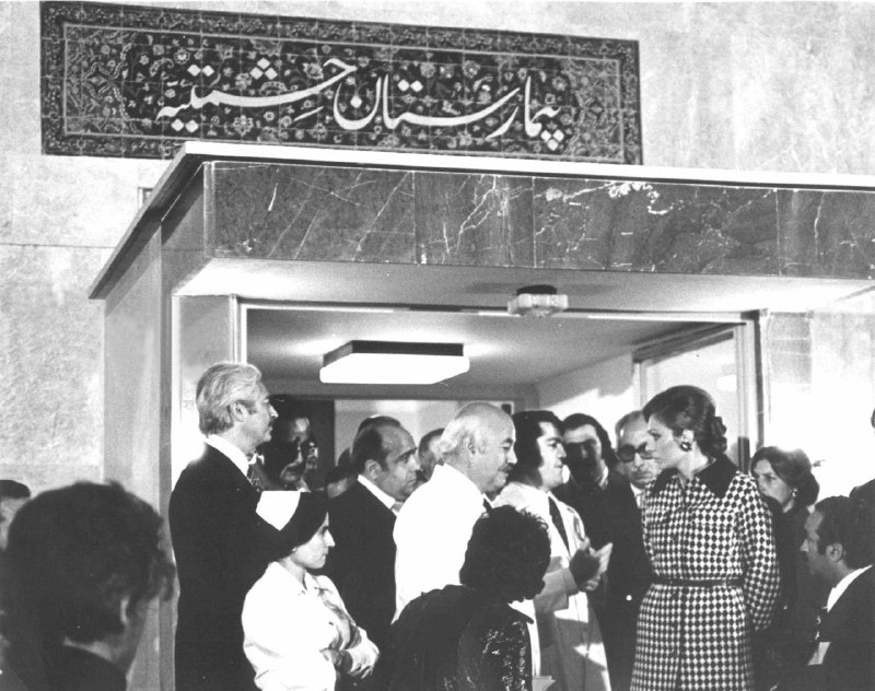 شهبانو فرح پهلوی در بازدید از بیمارستان حشمتیه سبزوار